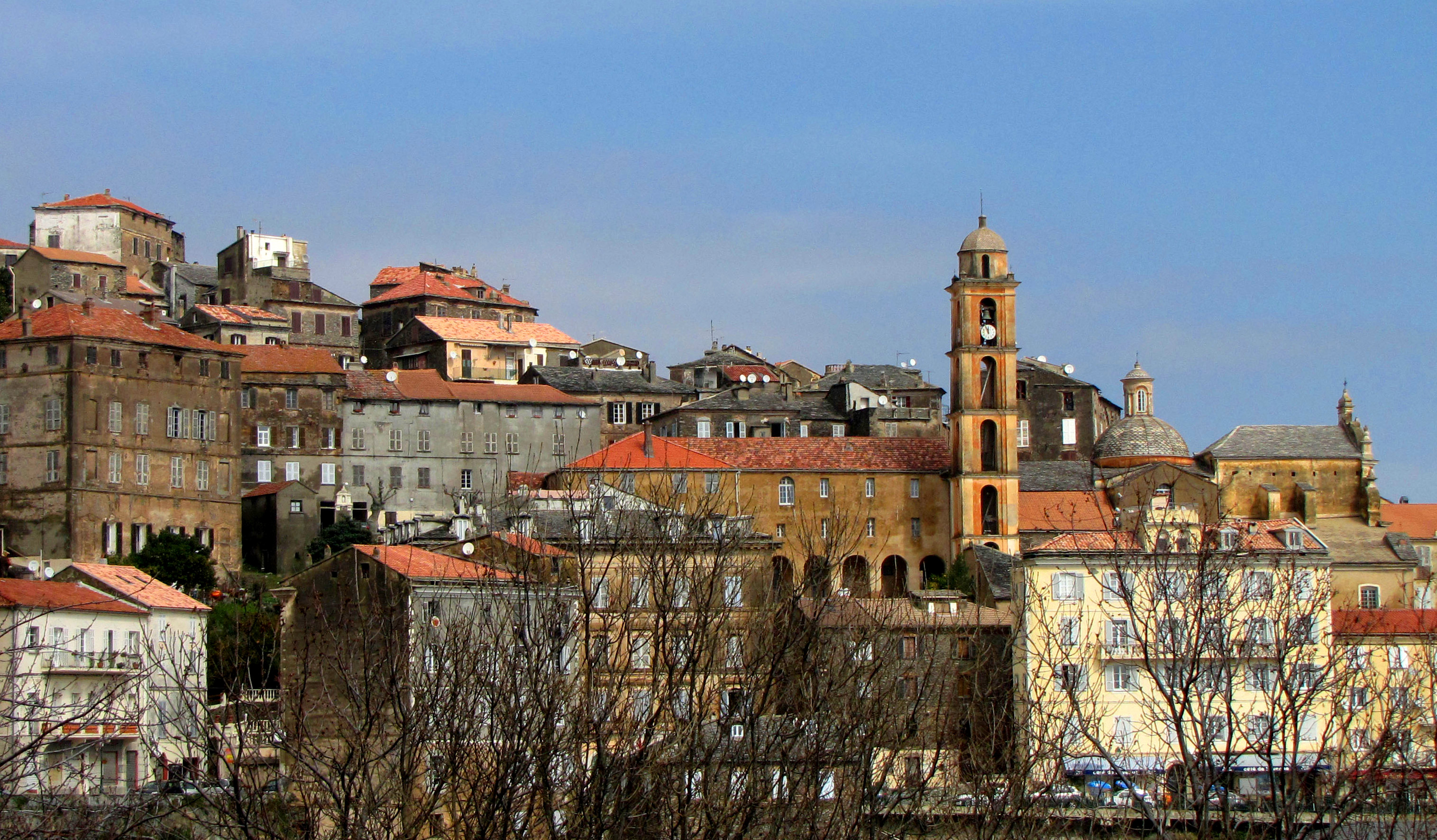 Vue de la vieille ville de Cervione.